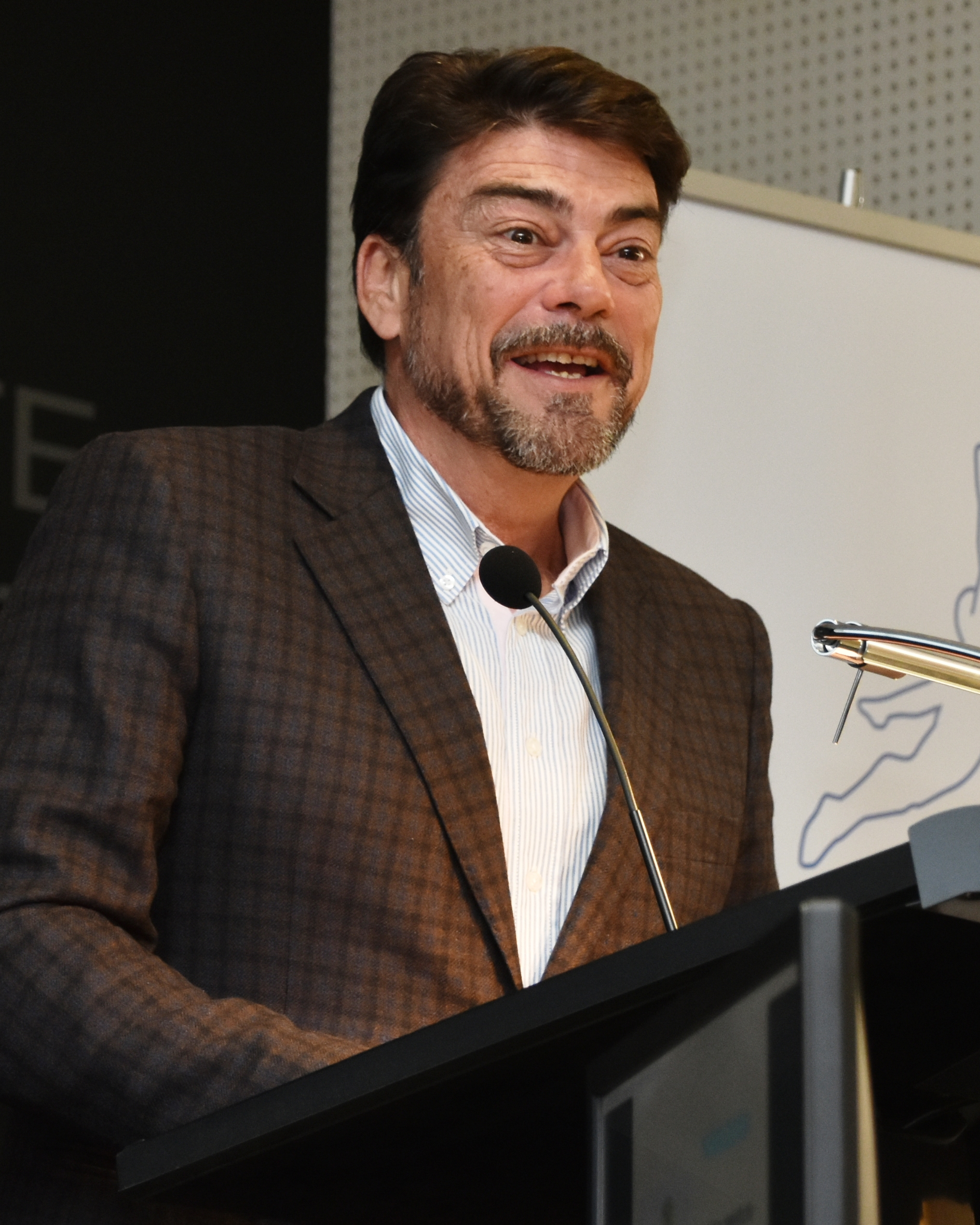 Luis Barcala